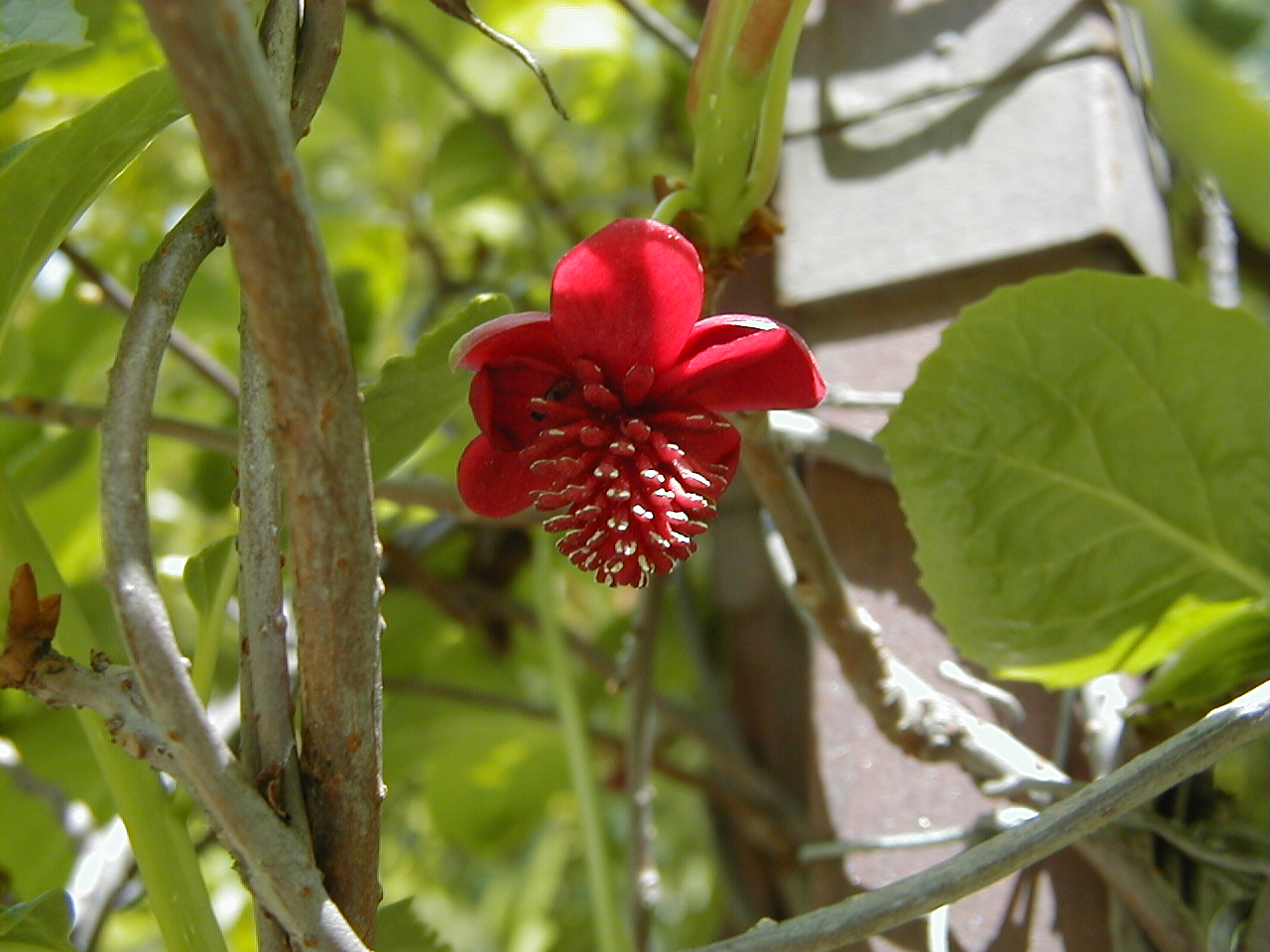 Schisandra rubriflora. Real Jardín Botánico, Madrid, España.